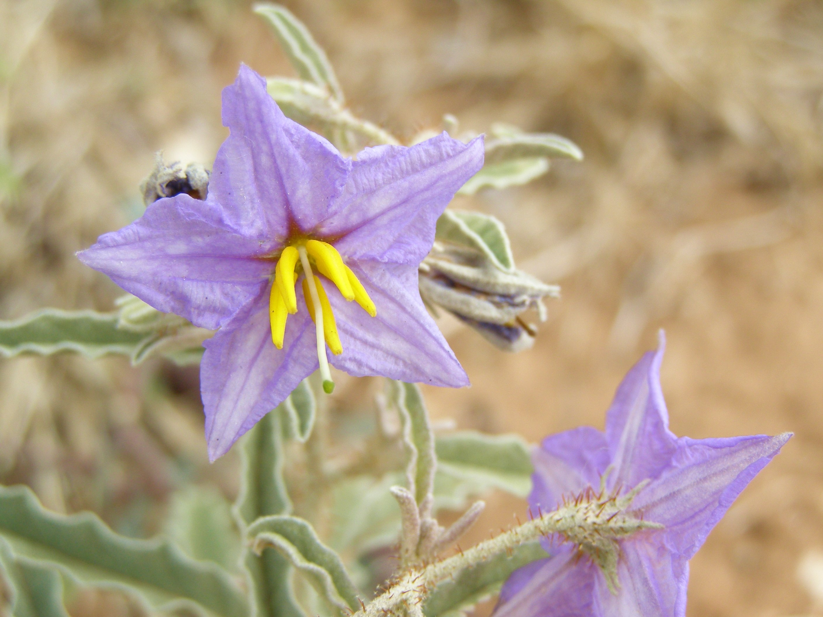 Solanum elaeagnifolium, Lubbock Texas